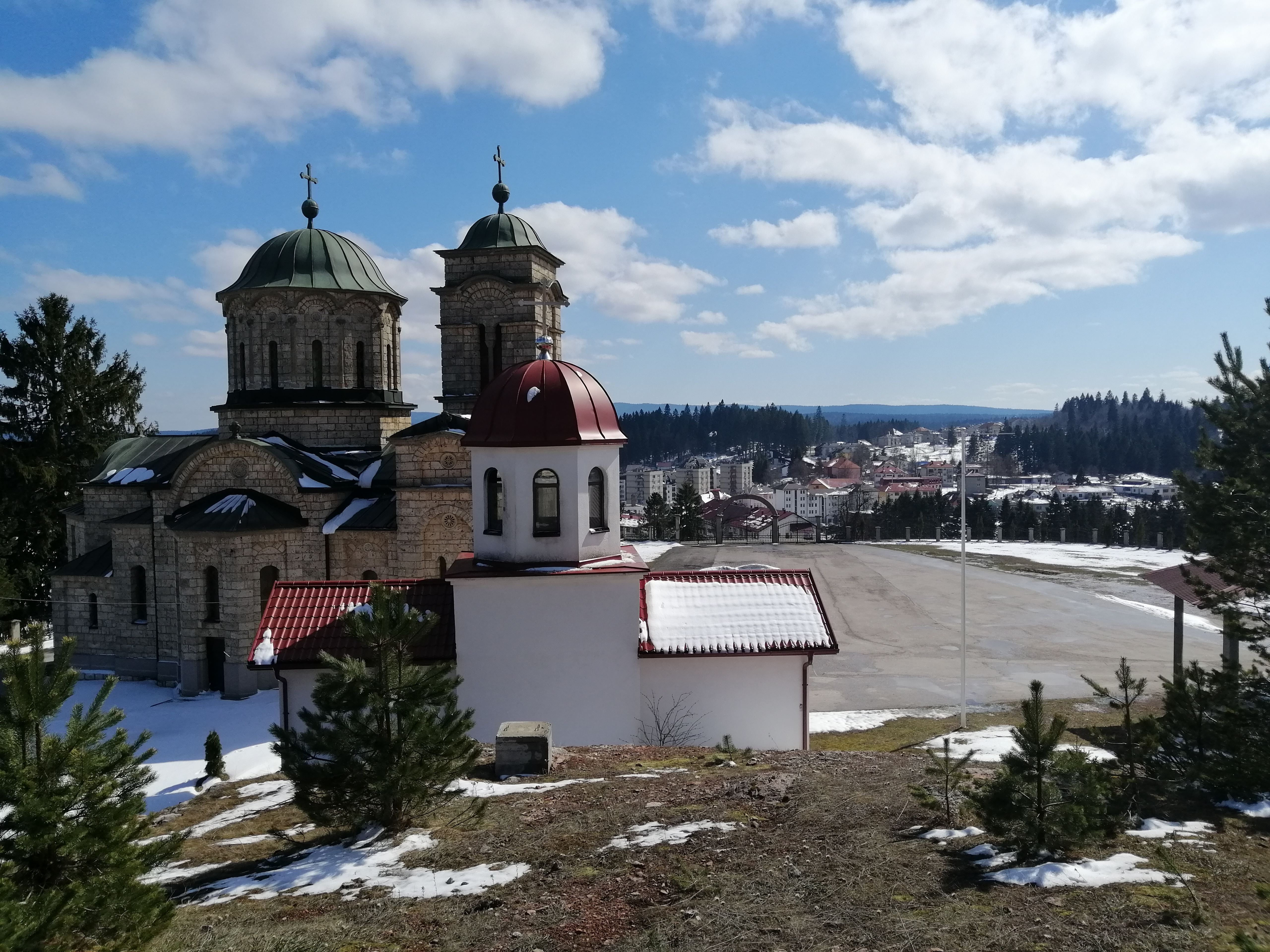 Хан Пијесак